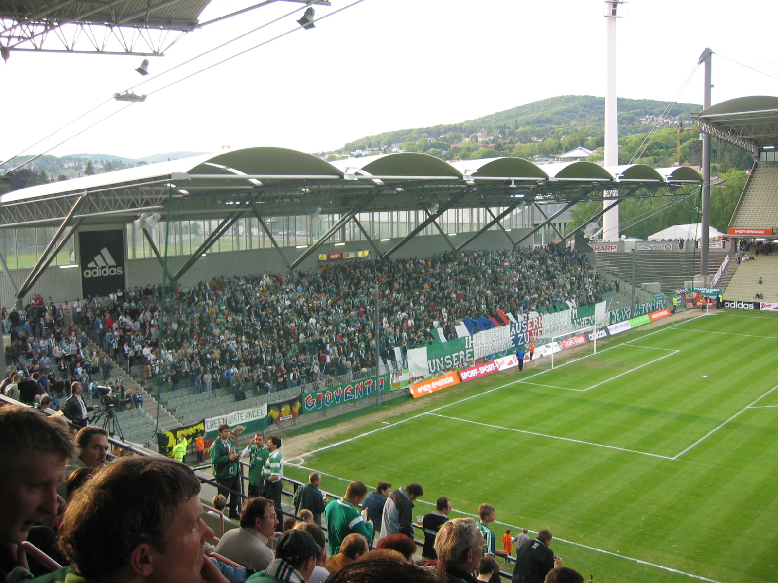 Hanappi-Stadion (Südribüne)